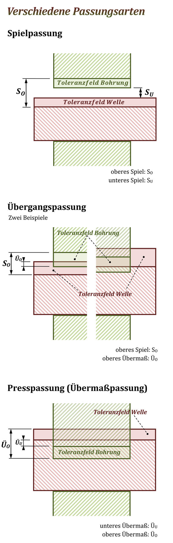 Die verschiedenen Passungsarten